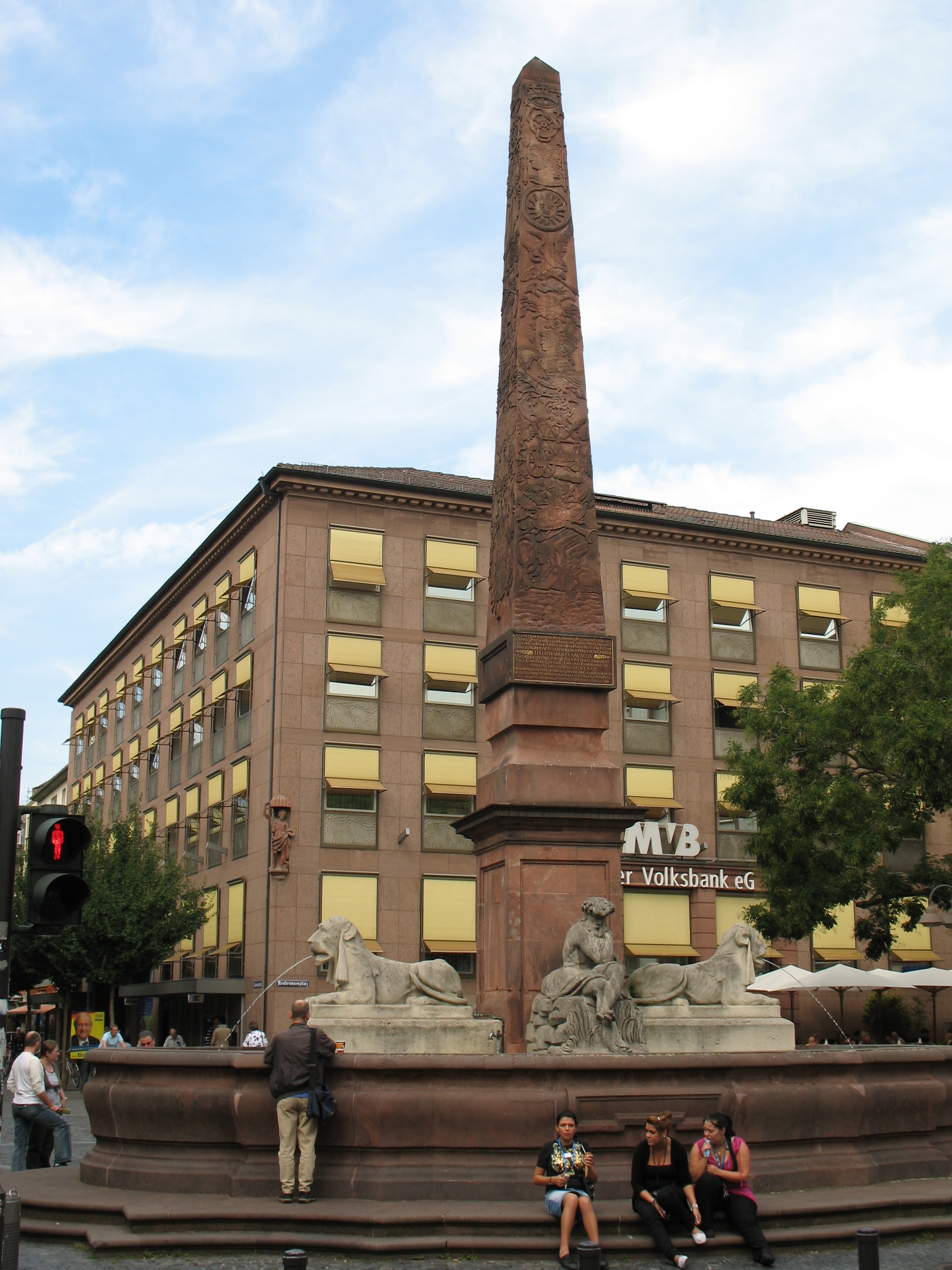 Mainzer Neubrunnen; erbaut 1726, erneuert 1877, zuletzt restauriert 2003